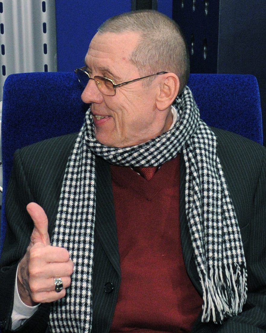 Валерий Сергеевич Золотухин